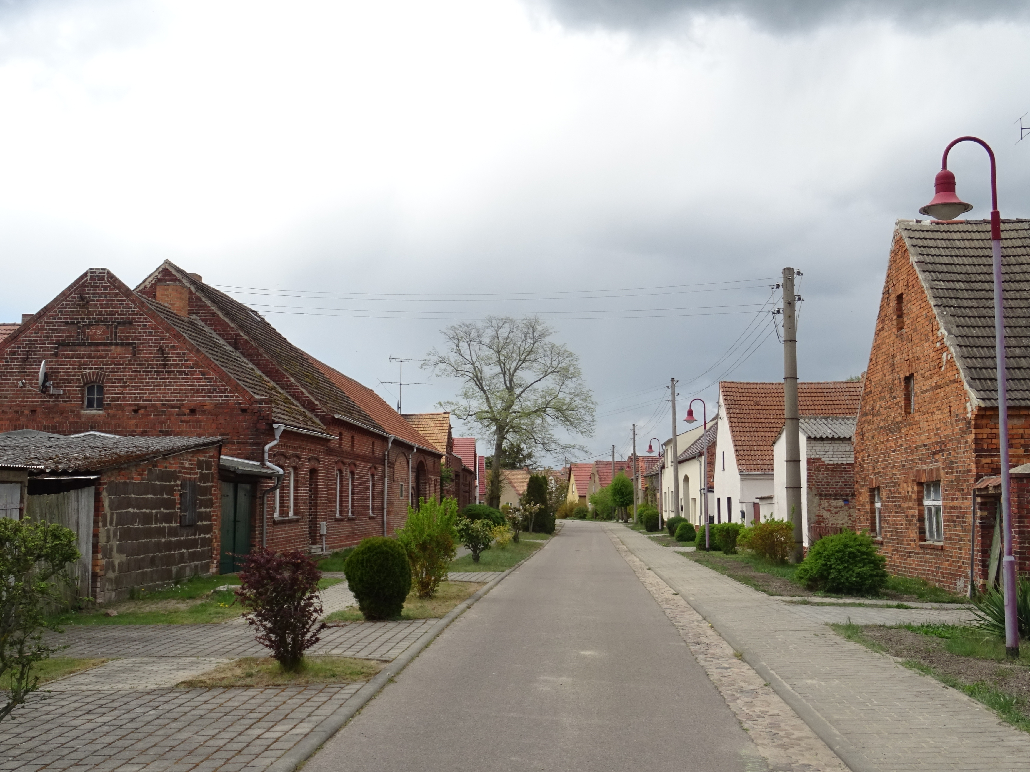 Straße (nördliche Seitenstraße) in Bollensdorf, Gemeinde Ihlow